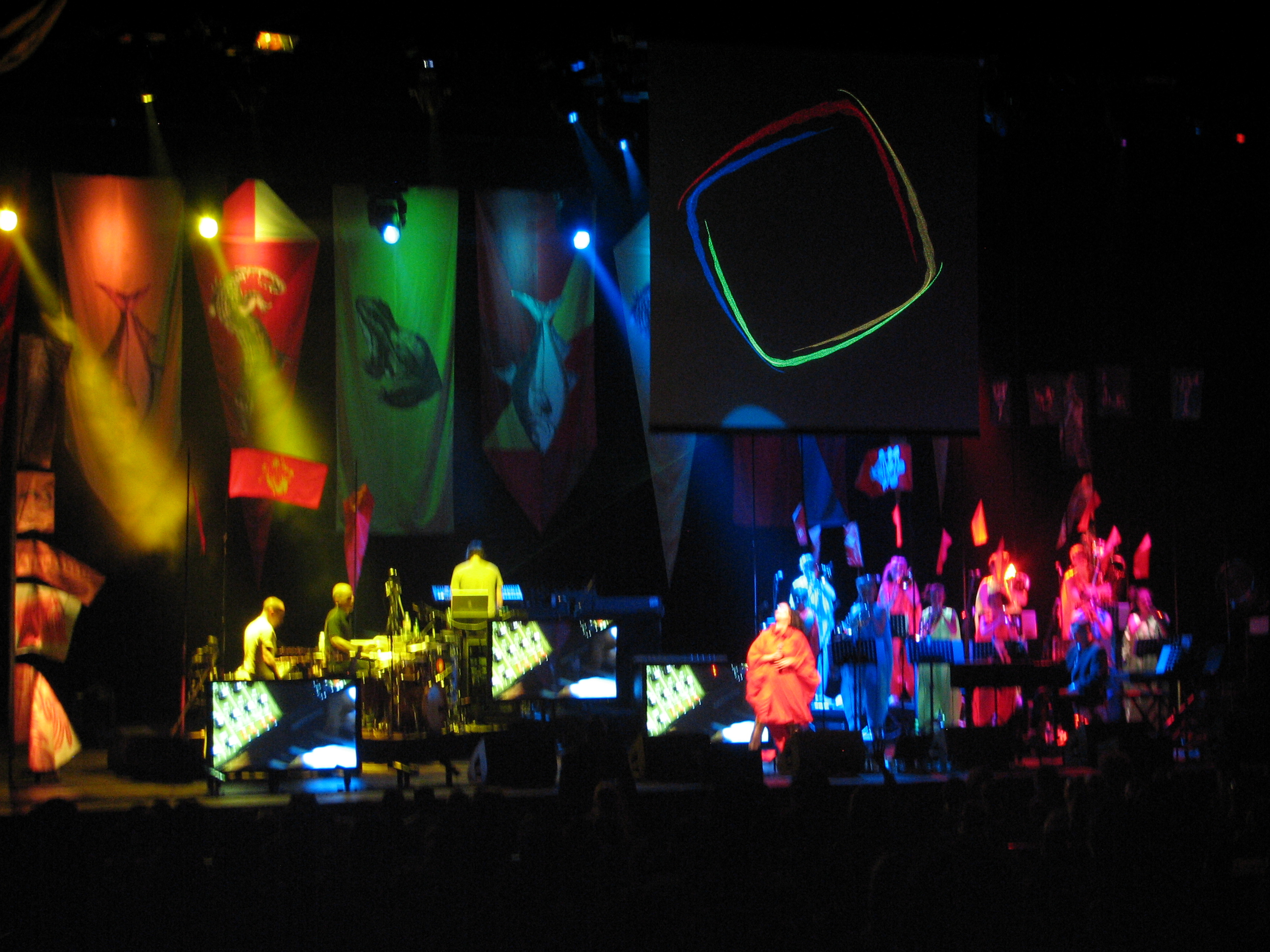 Blog Post